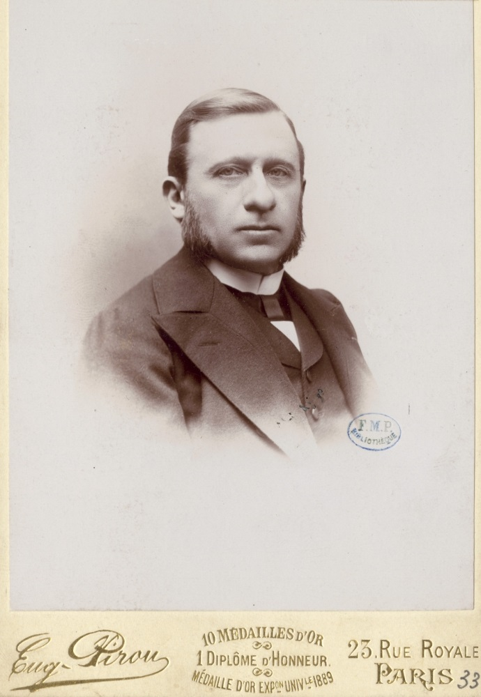 Lutaud, Auguste - re dell'Ile d'Or (Provenza) CIPH0033